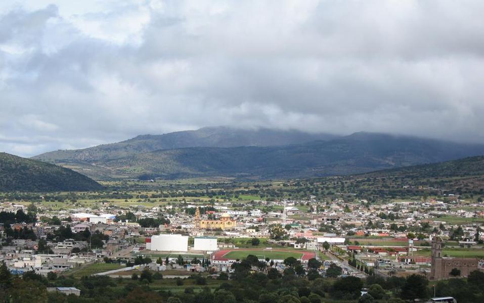 Vista panorámica de Tlaxco, Tlaxcala